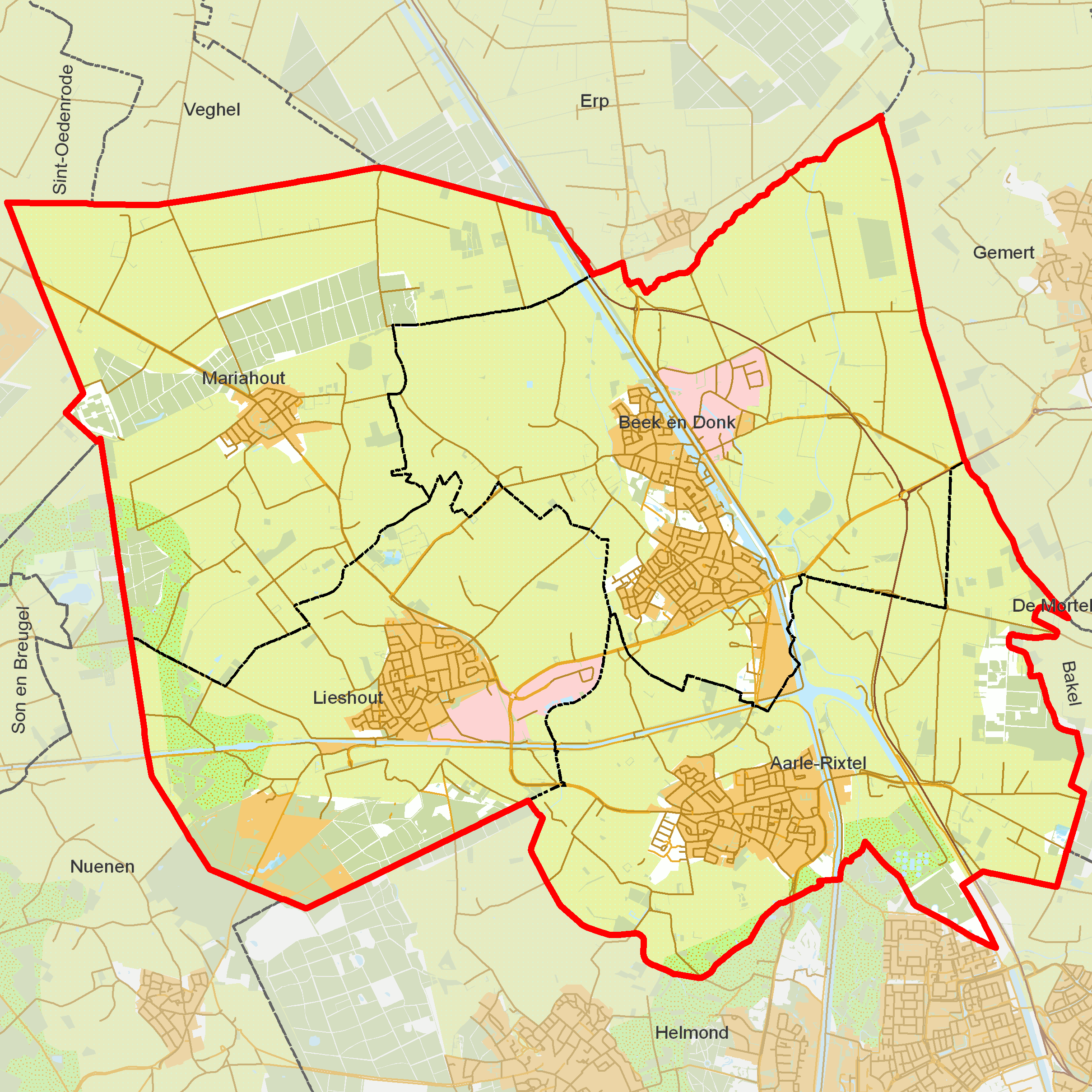 BAG woonplaatsen - Gemeente Laarbeek.png